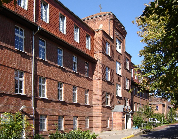 Haus Bethanien der Pfeifferschen Stiftungen Magdeburg-Cracau, errichtet 1926